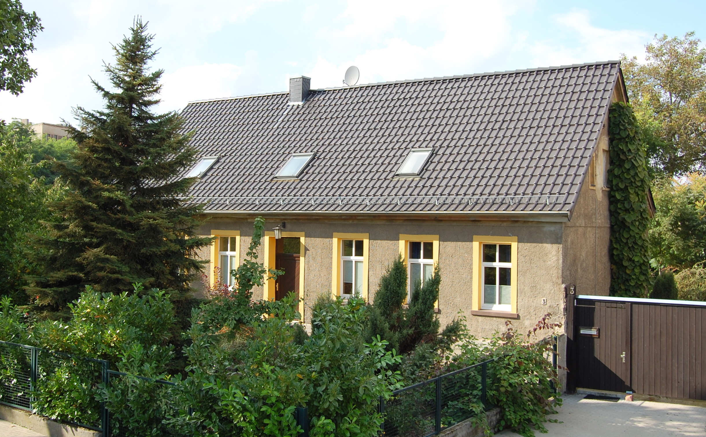 Sohlener Straße 3 in Magdeburg-Westerhüsen, ehemalige Schule